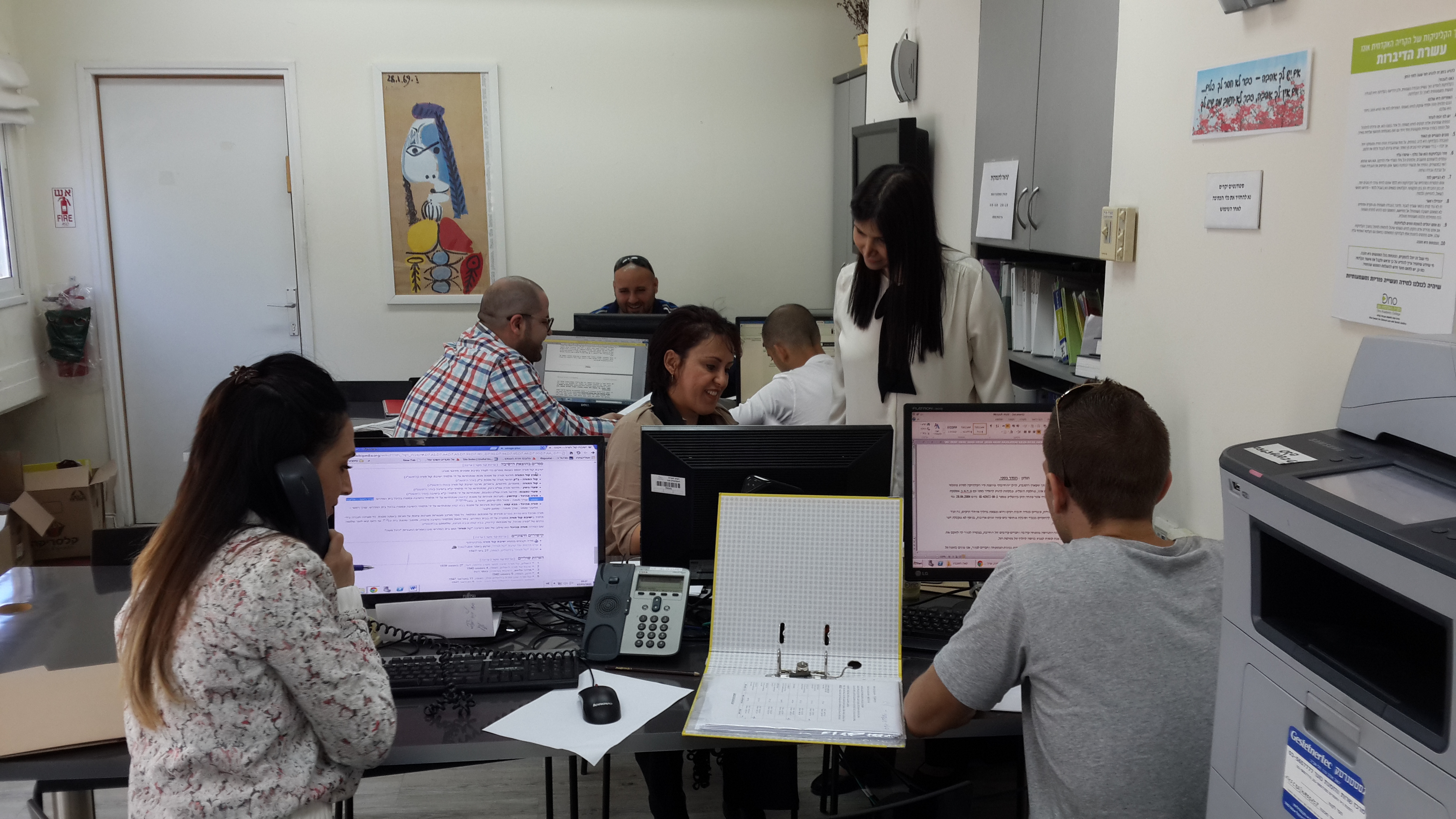 קליניקת מר"פ